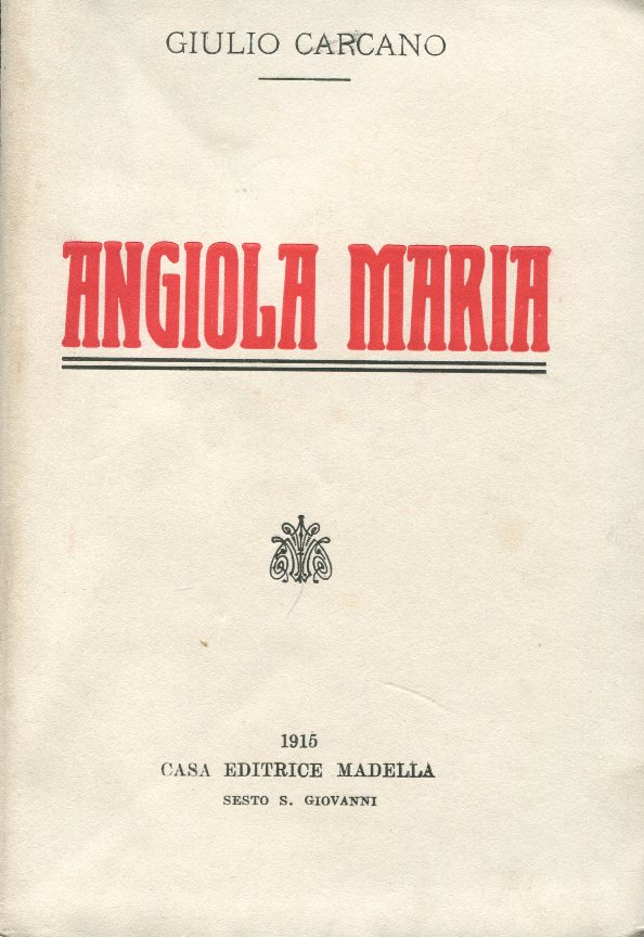 Romanzo